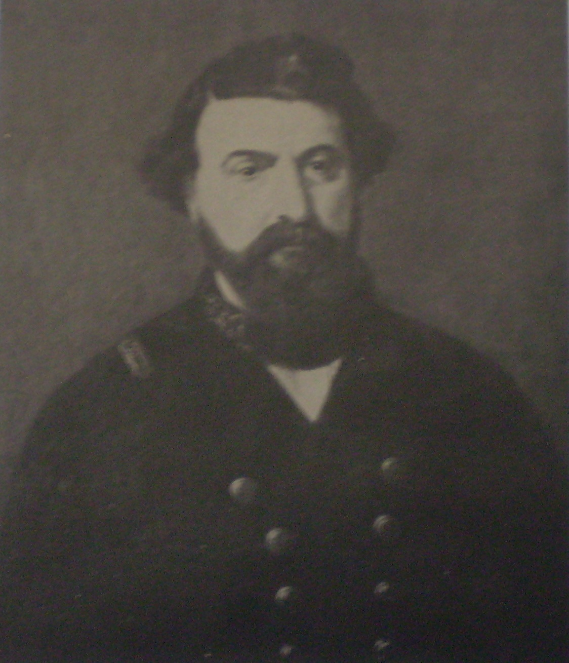 José Murature. Óleo de I. Manzini. MHN